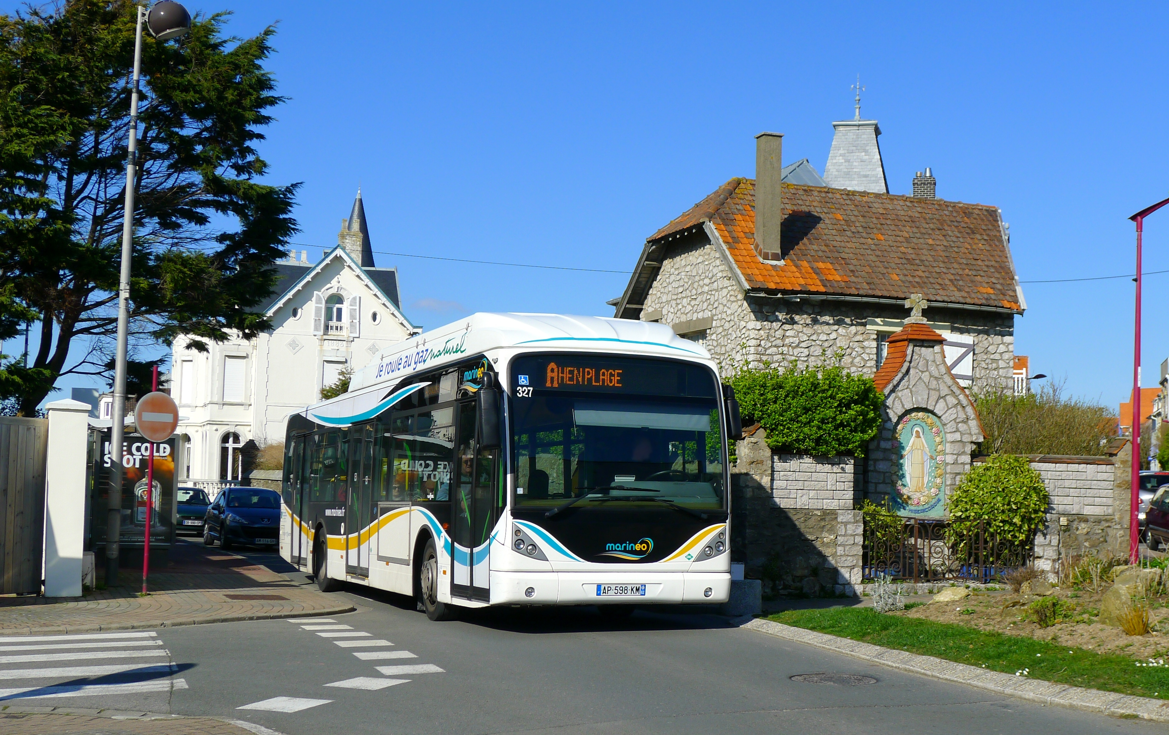 Autobus Vanhool A330 GNV du réseau Marinéo de Boulogne-sur-Mer à Wimeureux à l'arrêt Saint-Maurice